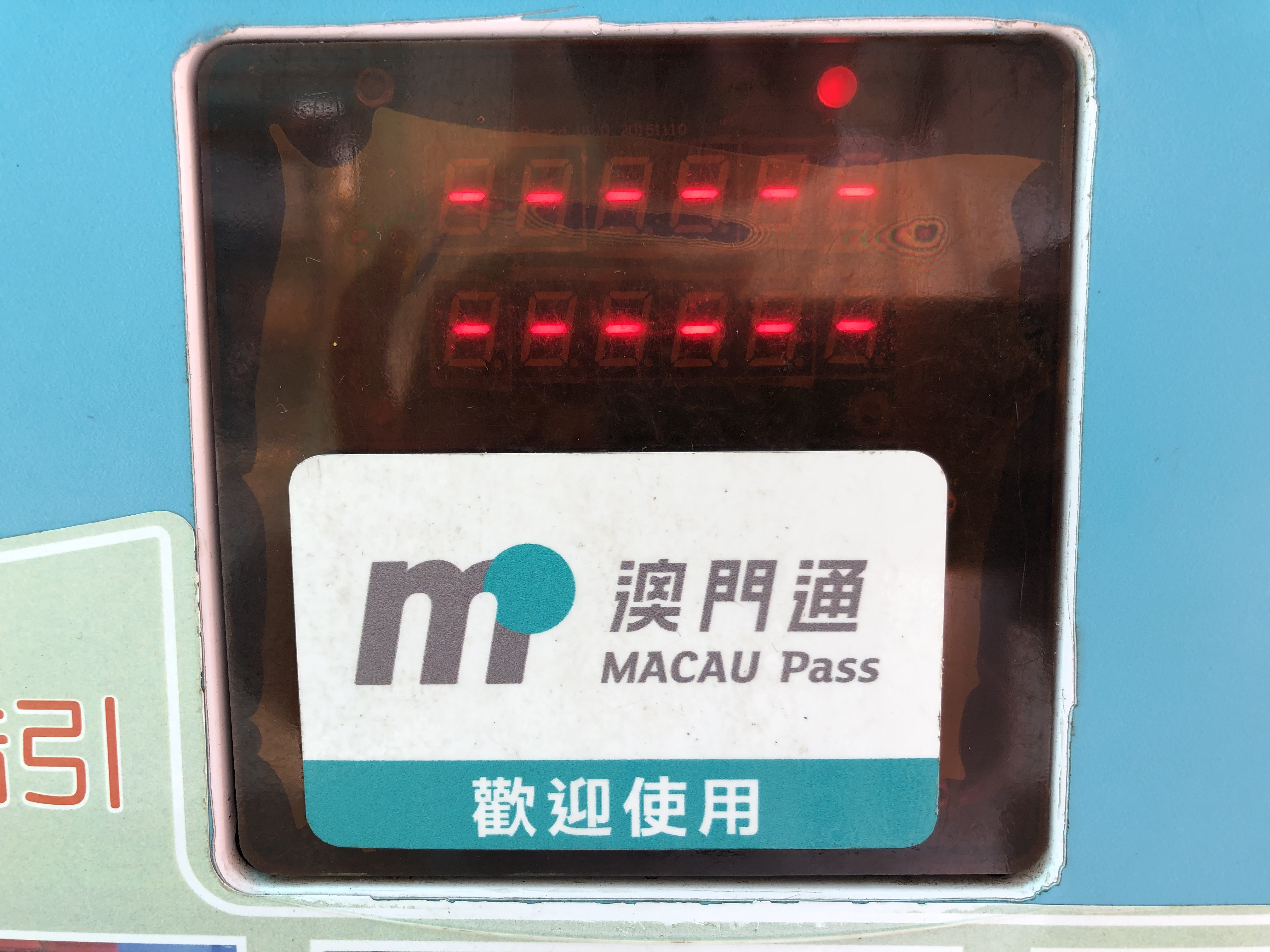 僅支援澳門通卡的澳門通感應器。